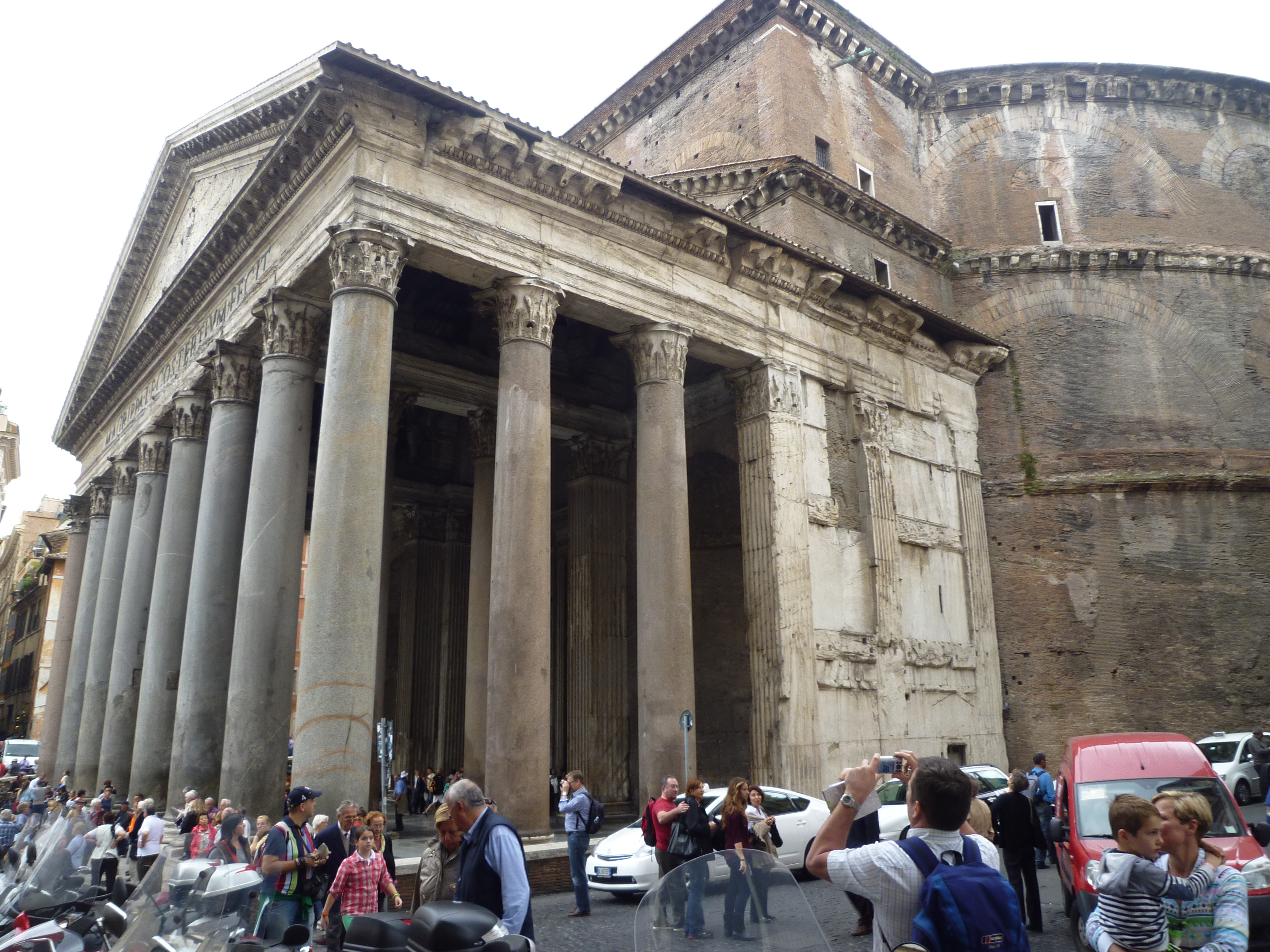 Rome, summer 2012